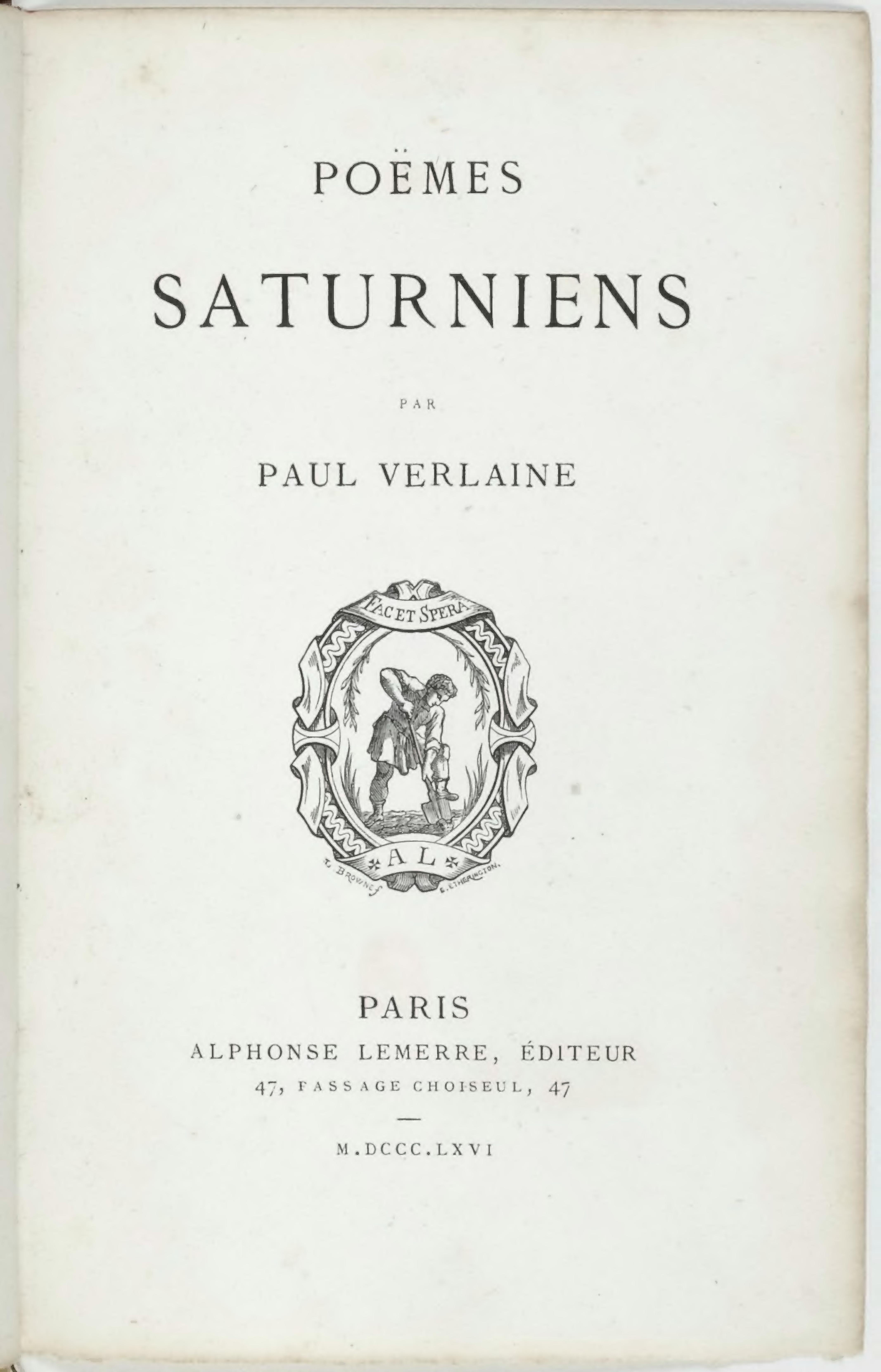 Page de garde (n°15) de l'édition originale de 1866 des Poèmes saturniens de Paul Verlaine